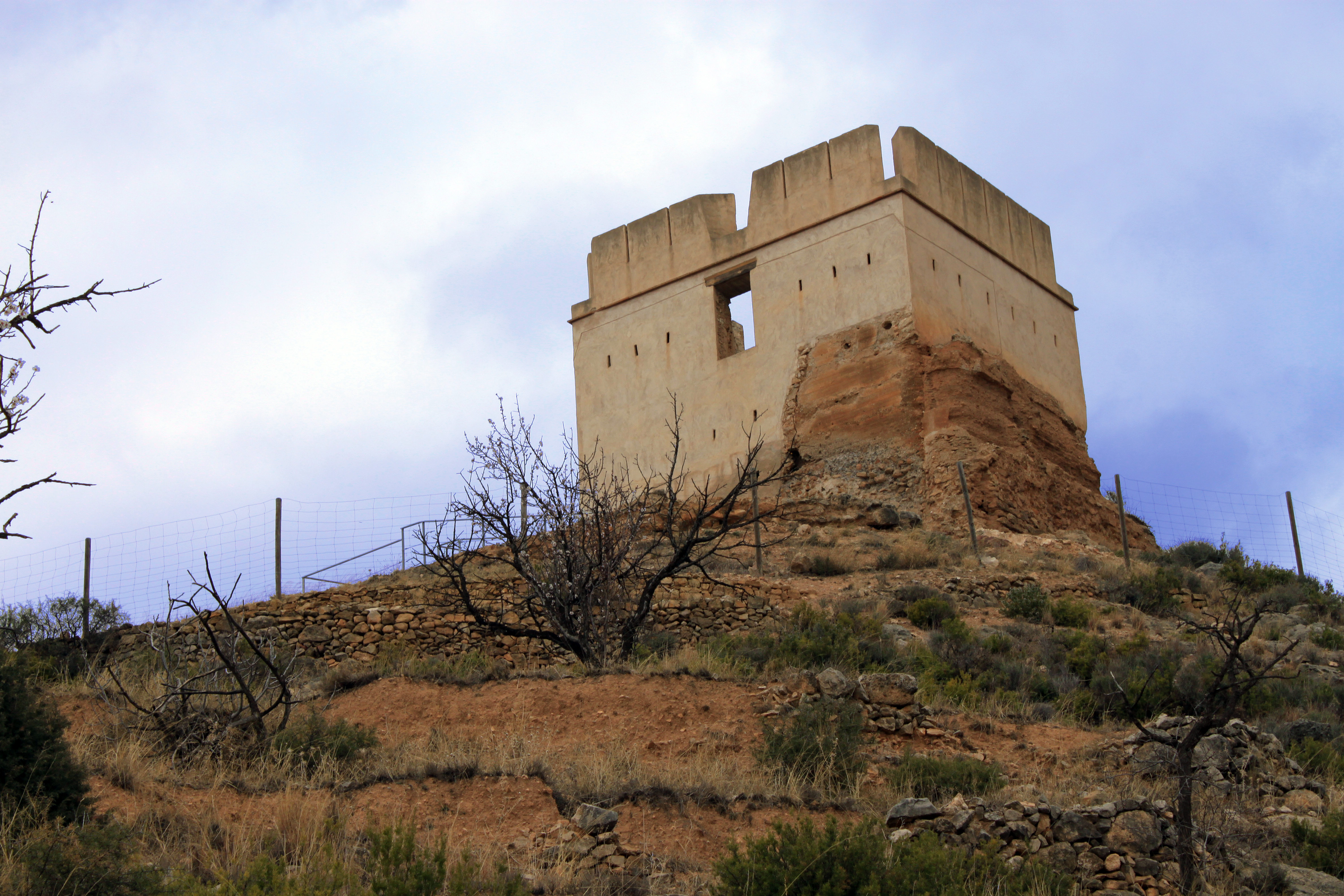 La Torrecilla, antigua torre defensiva islámica construída sobre un poblado romano en la localidad de Chelva, provincia de Valencia, Comunidad valenciana.